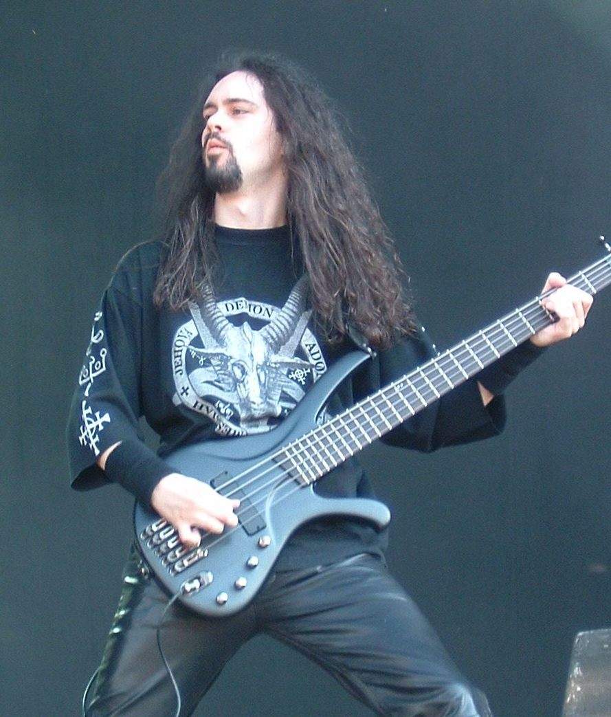 Johan Niemann 2004 M'era Luna Festival